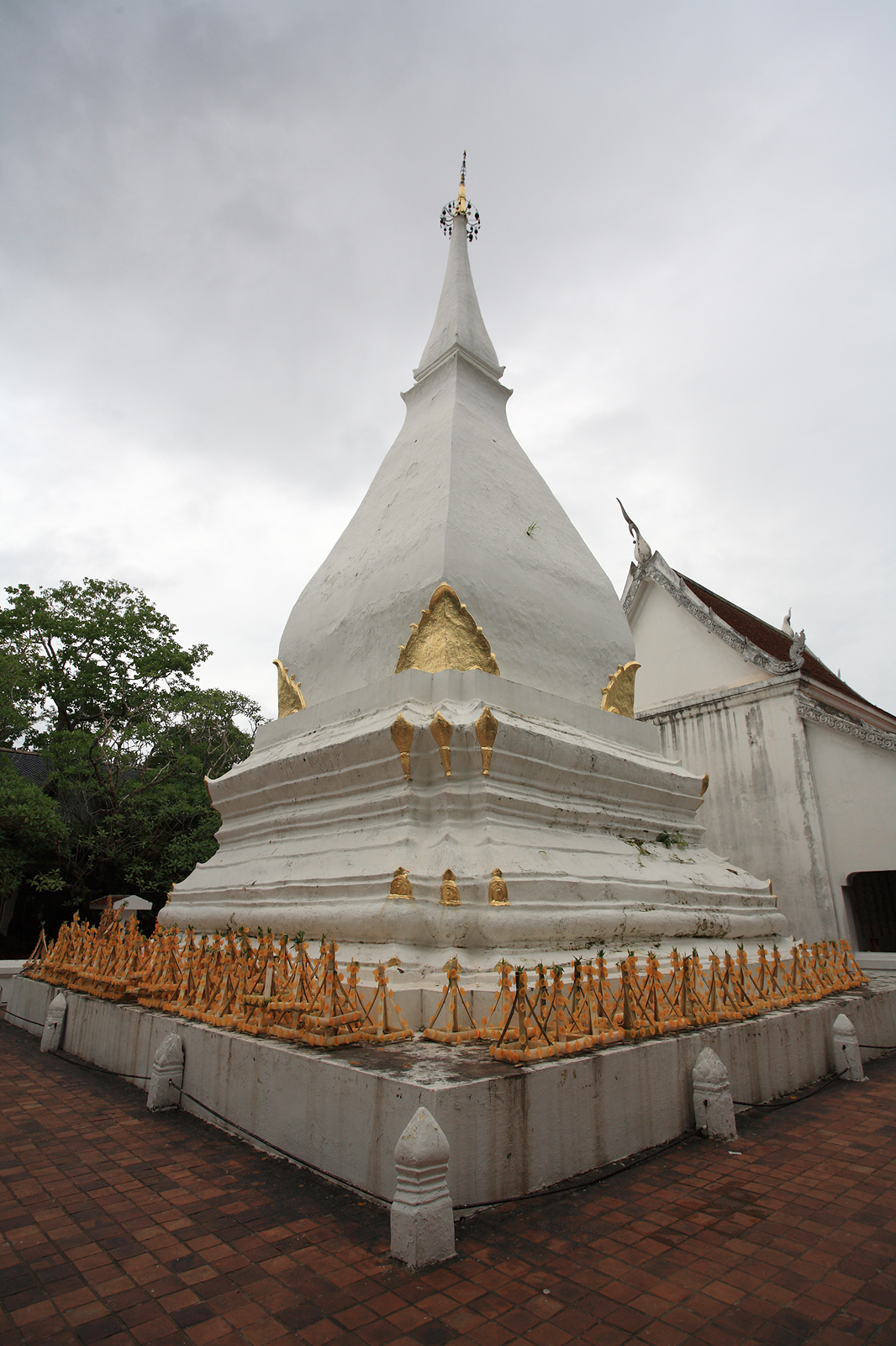 พระธาตุศรีสองรักษ์